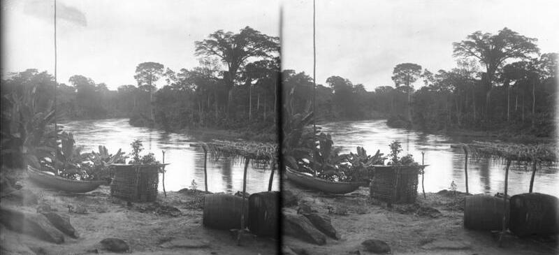 Kamerun, Mundame, Mungo Mundame.- Der Mungo 25.7.1904 [Kamerun, Mundame.- Hütte und Kanu am Ufer des Flusses Mungo (Stereobild)]